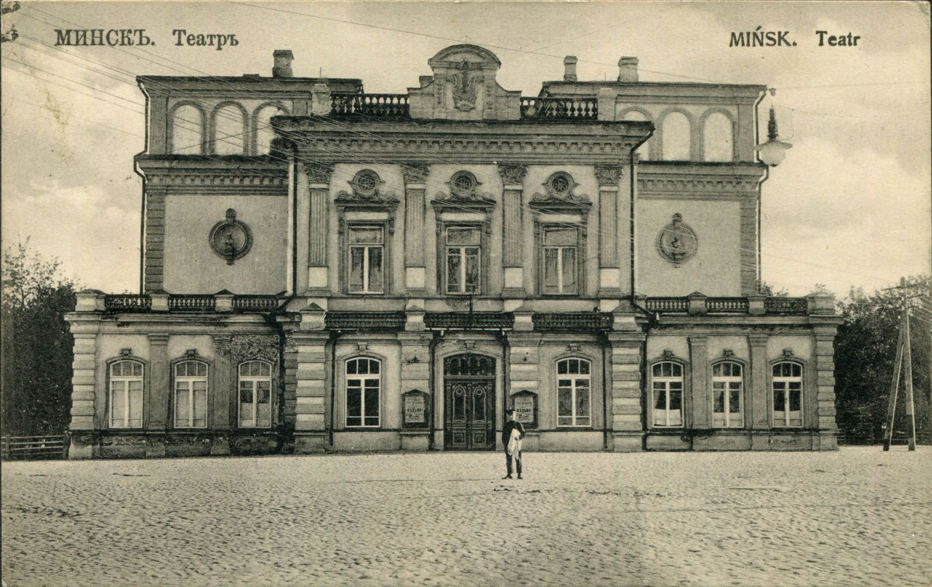 Беларуская (тарашкевіца): Менск (Miensk). Мескі, цяпер Купалаўскі тэатар (Kupałaŭski).